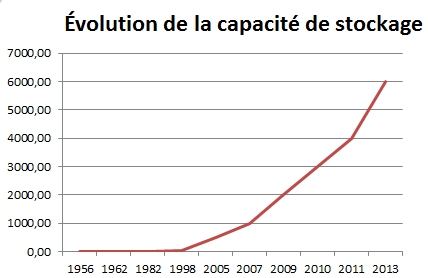 Évolution de la capacité du stockage entre 1956 (RAMAC 305) et aujourd'hui.